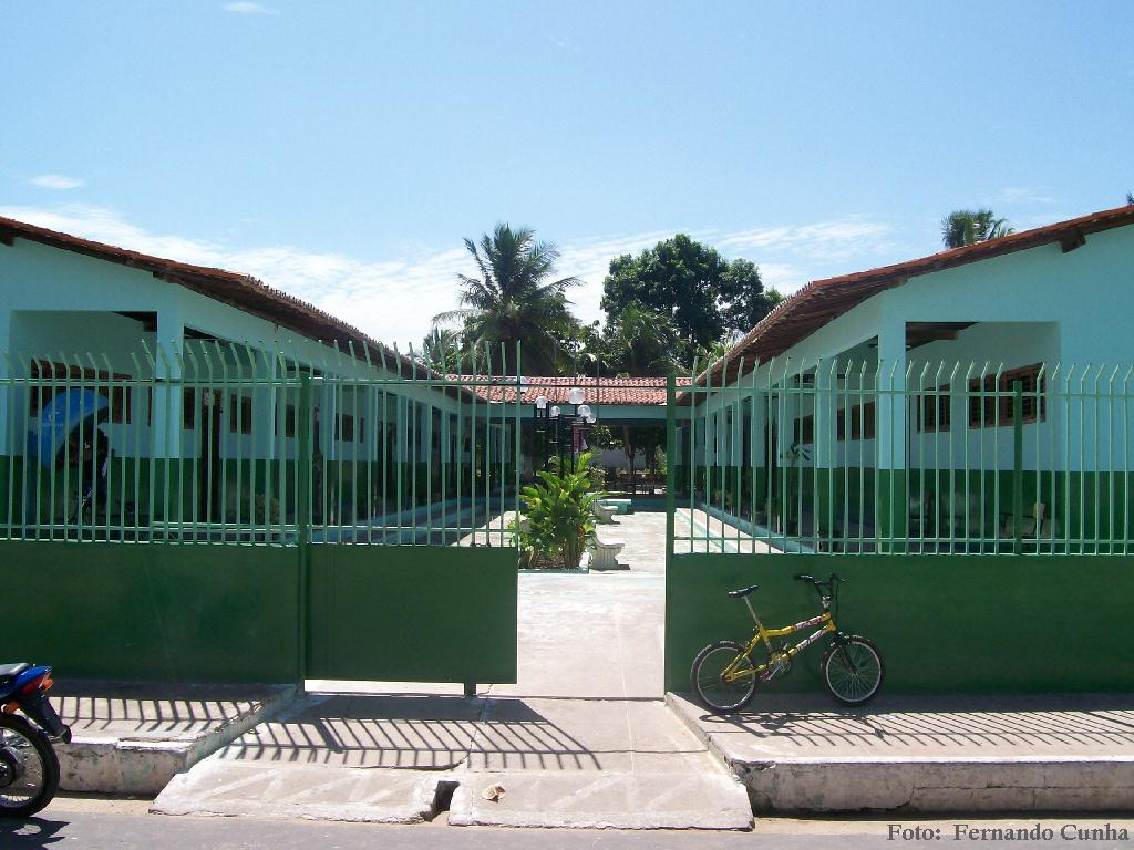 Escola pública em alto alegre do Pindaré, Maranhão Brasil.